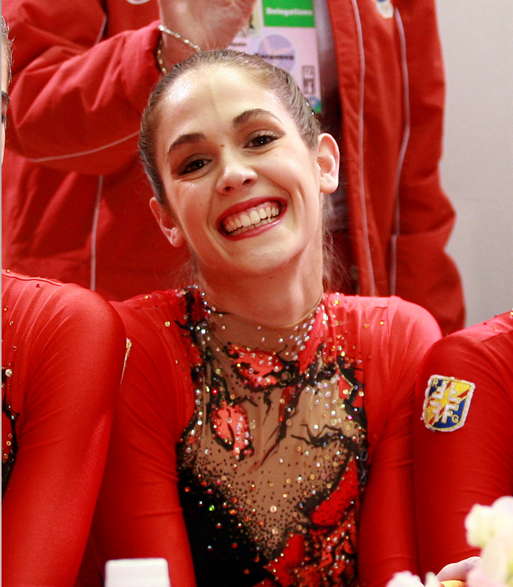 Bárbara González en la Final de la Copa del Mundo de 2006 en Mie.